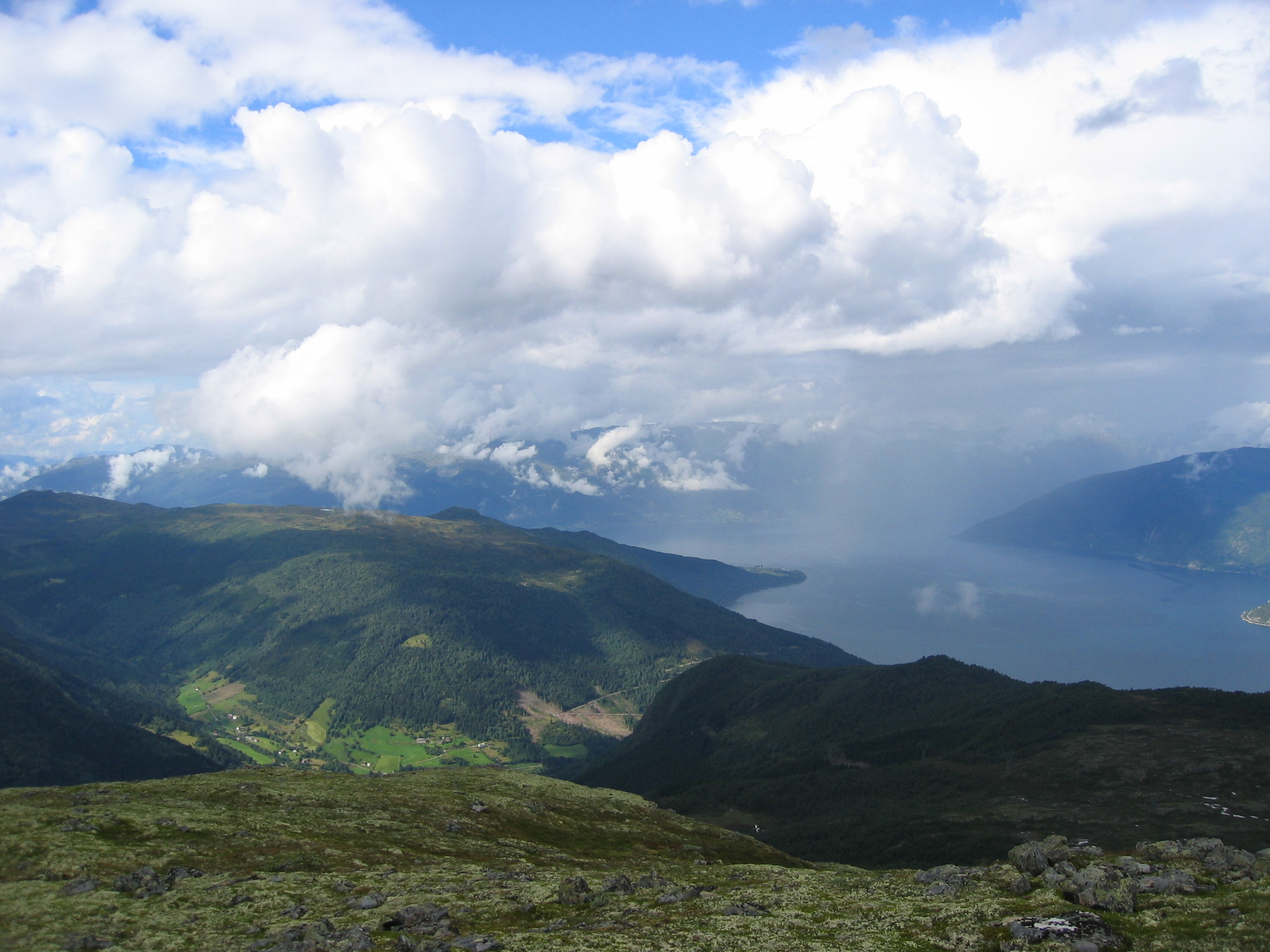 Feios, Sognefjorden til høgre.